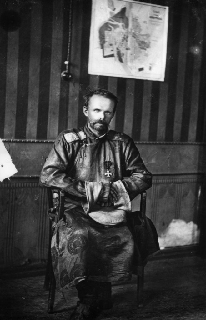 Генерал-лейтенант барон Роман Федорович фон Унгерн-Штернберг в Иркутске на допросе в штабе 5-й советской армии. 1—2 сентября 1921 года